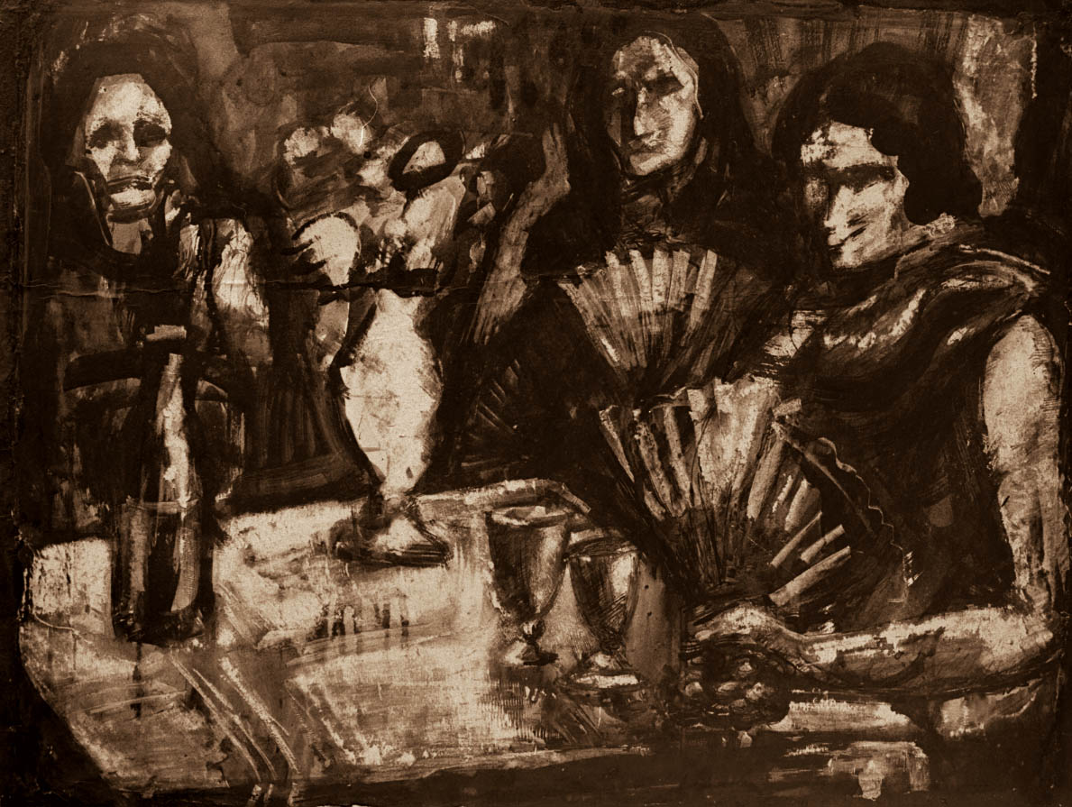 Sepia sur papier, 1932